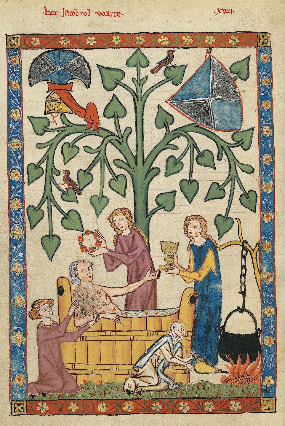 Codex Manesse, UB Heidelberg, Cod. Pal. germ. 848, fol. 46v: Herr Jakob von Warte